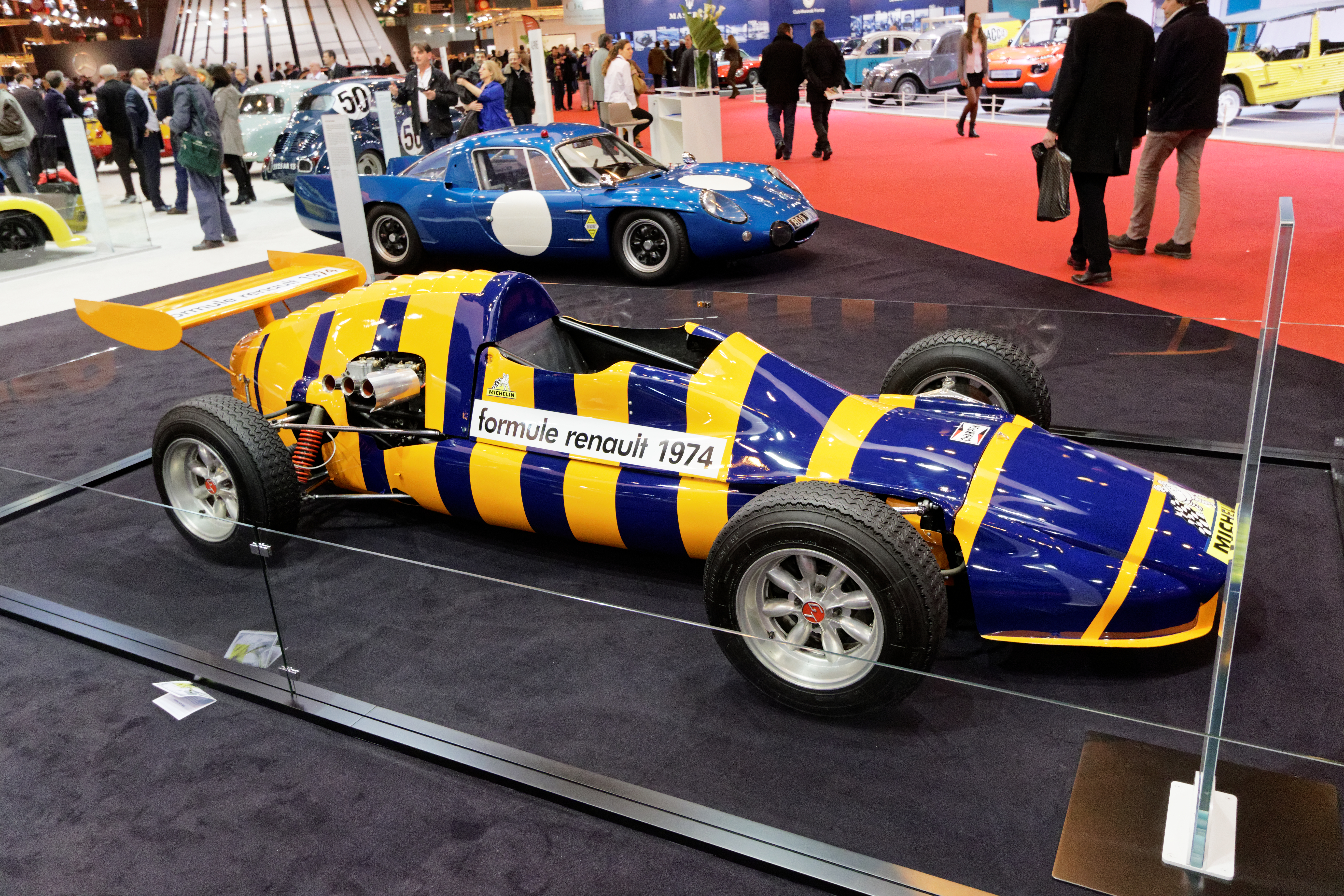 Une Alpine A366 de 1973 exposée lors du salon Rétromobile 2016.